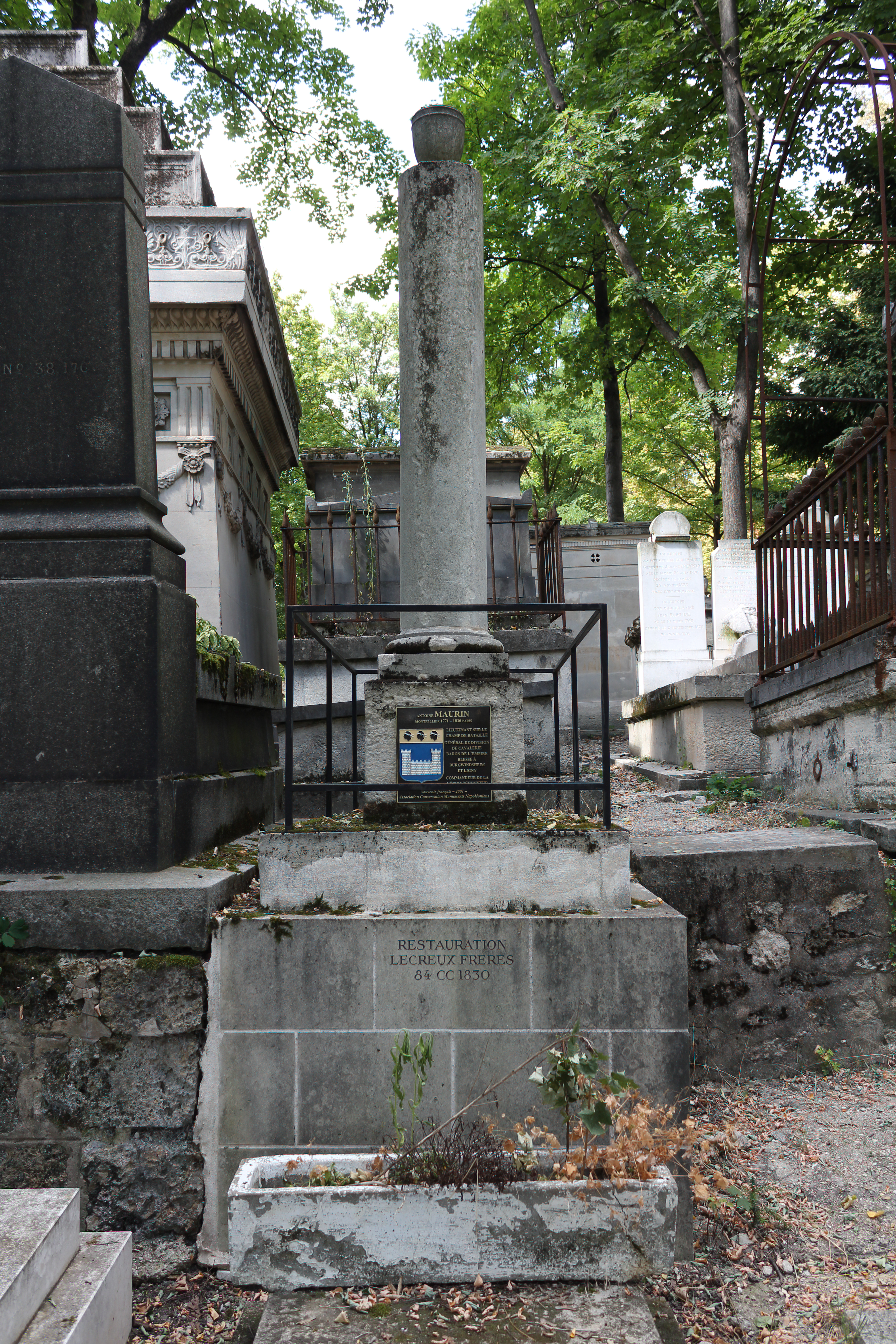 Sépulture d'Antoine Maurin (1771-1830), lieutenant général français de la Révolution et de l’Empire.